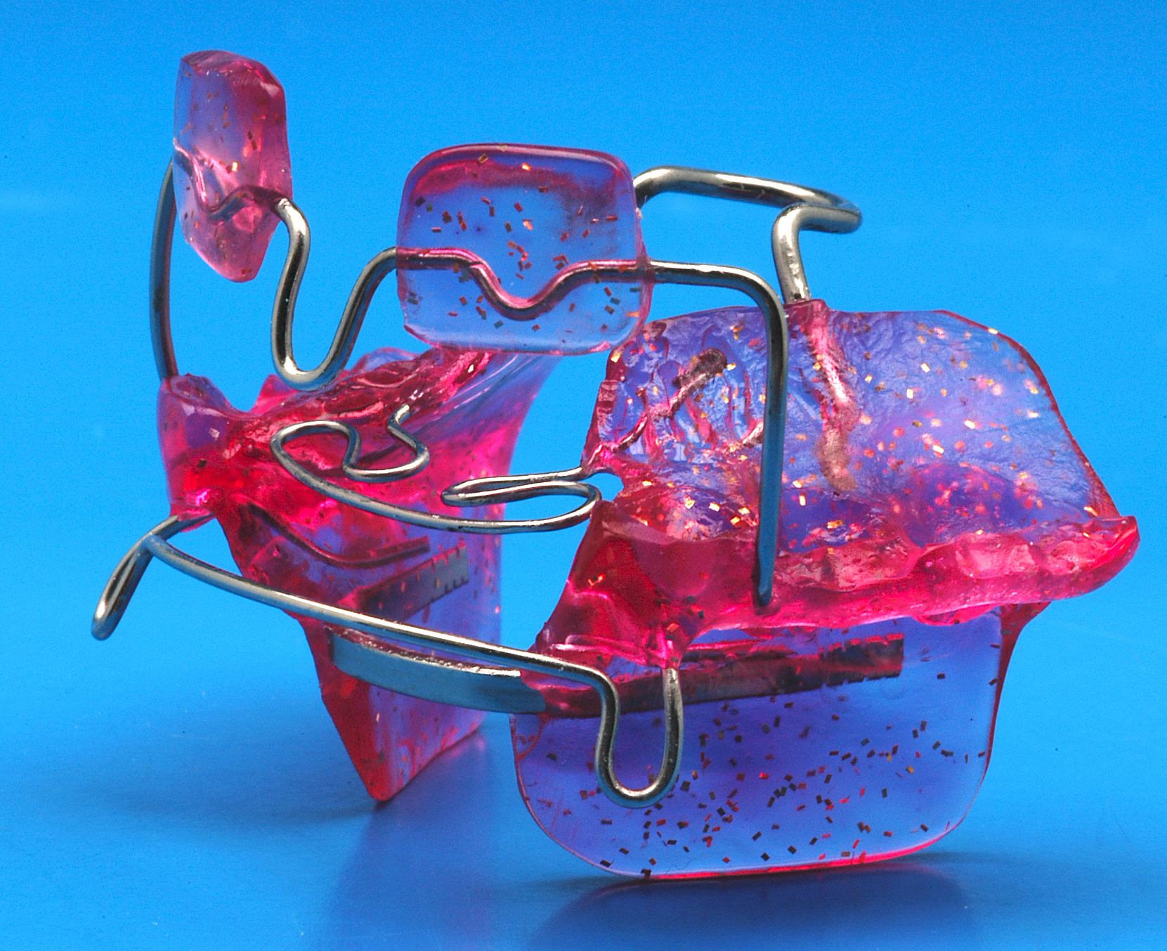 Dieses Bild stellt eine kieferorthopädische Apparatur dar, welche zur Korrektur einer Progenie bzw. eines Mesialbisses verwendet wird